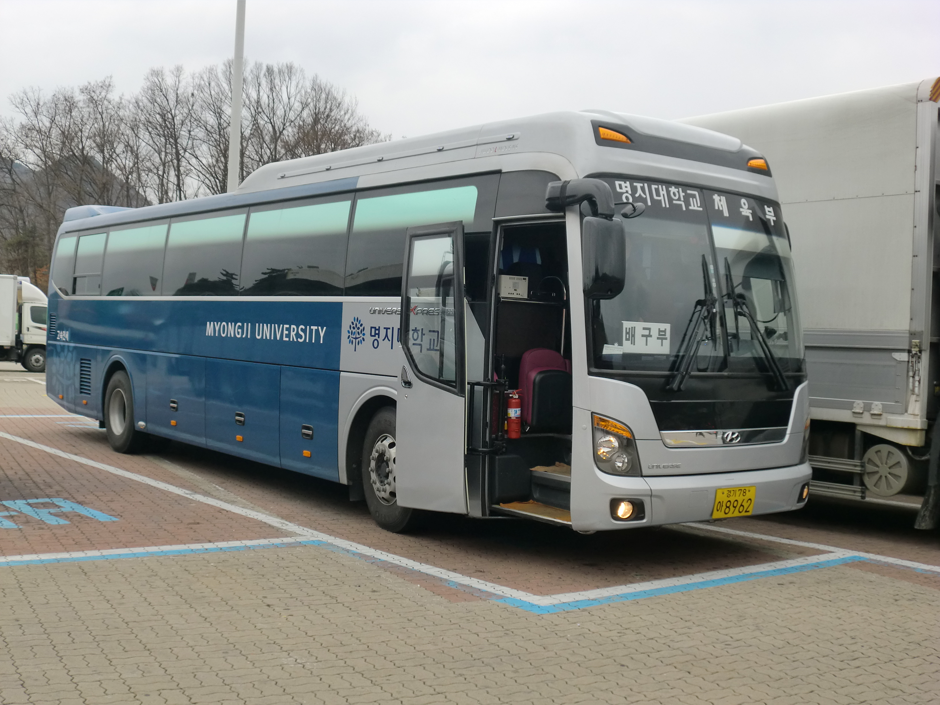 명지대학교 체육부 버스